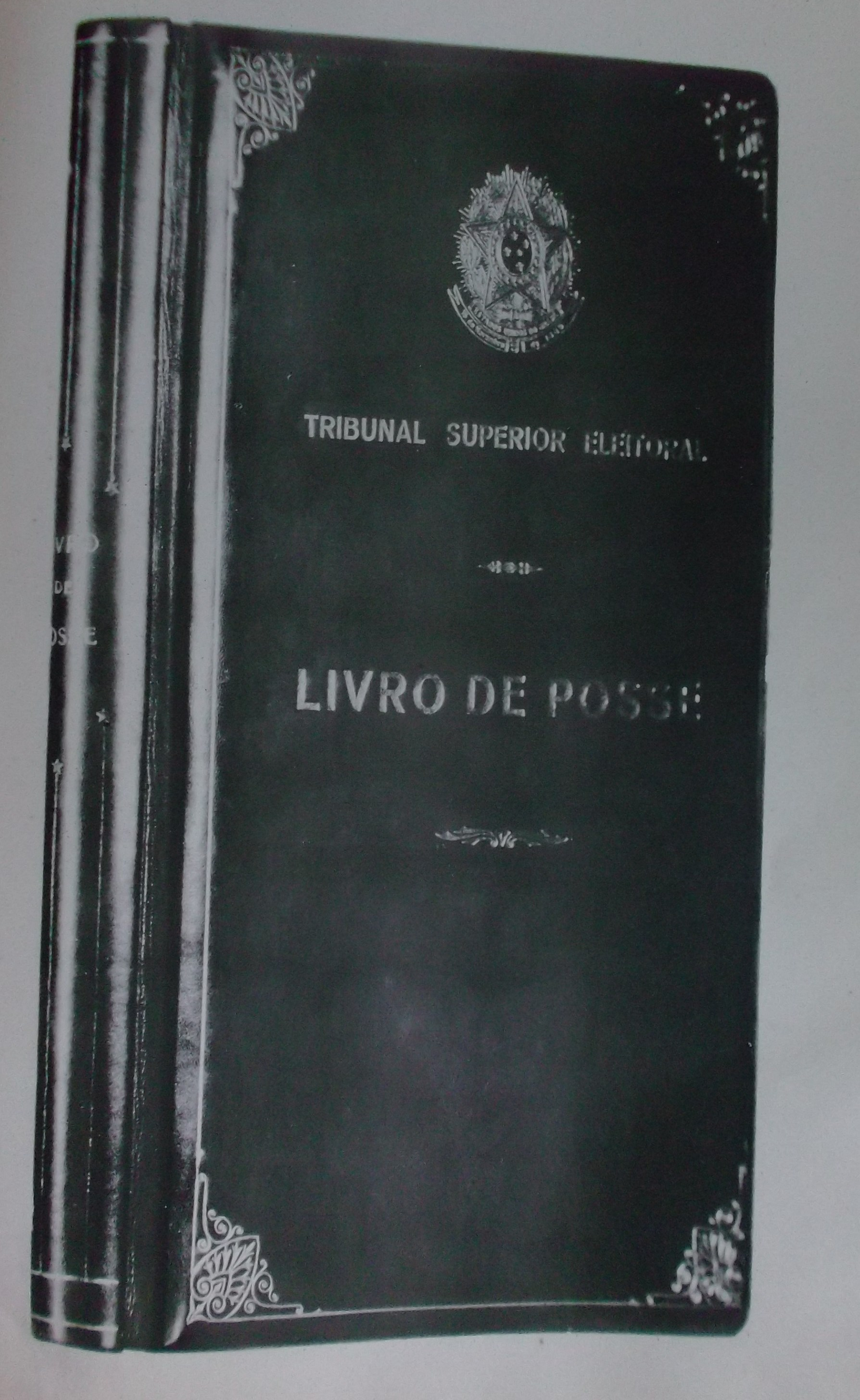 Livro de Posse do Tribunal Superior Eleitoral utilizado na posse presidencial de eurico Gaspar Dutra em 1946